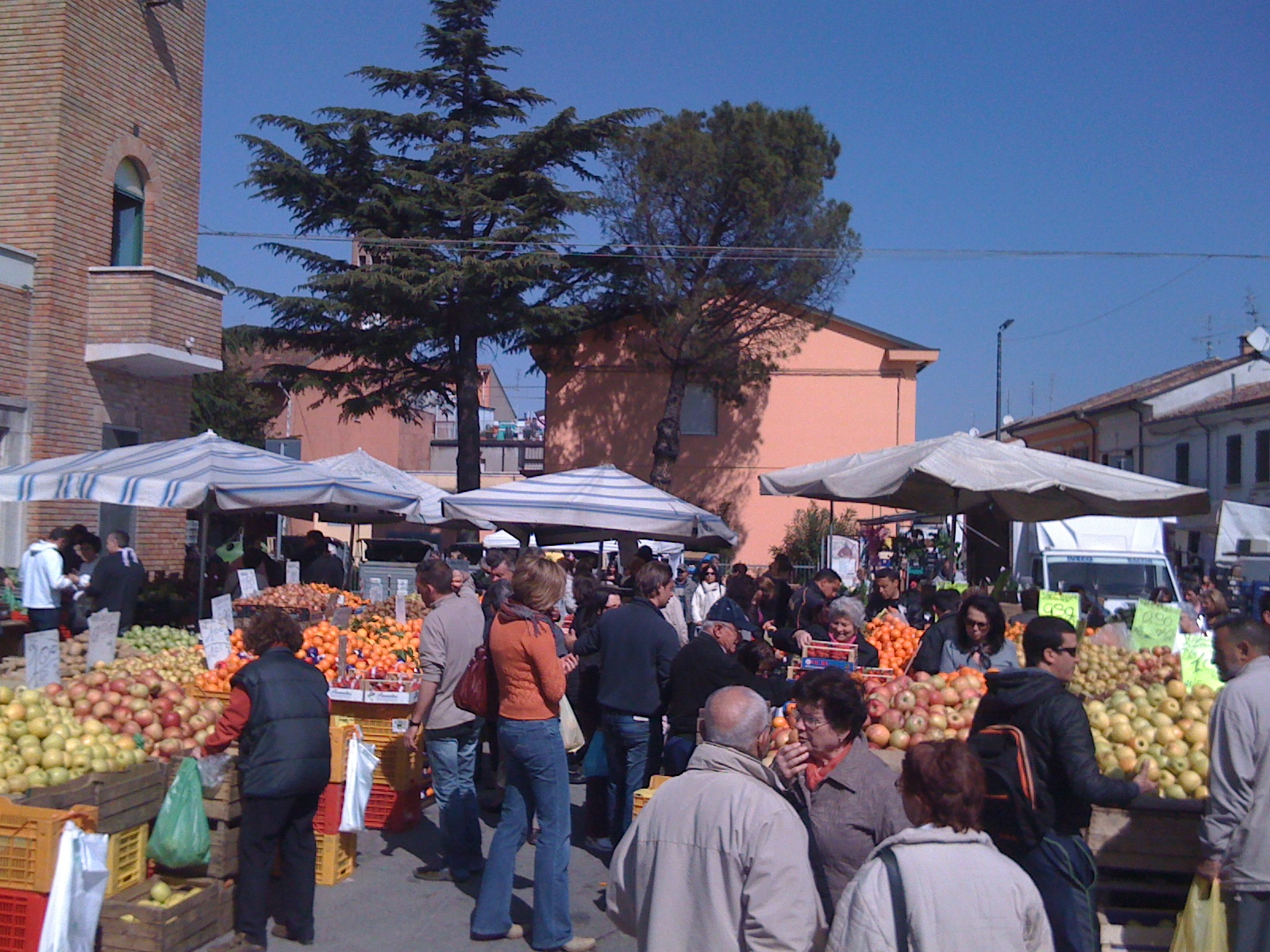 Autore: Nicholas Montemaggi Descrizione: Mercato di San Mauro Pascoli Licenza d'uso: Creative Commons Attribuzione 2.0